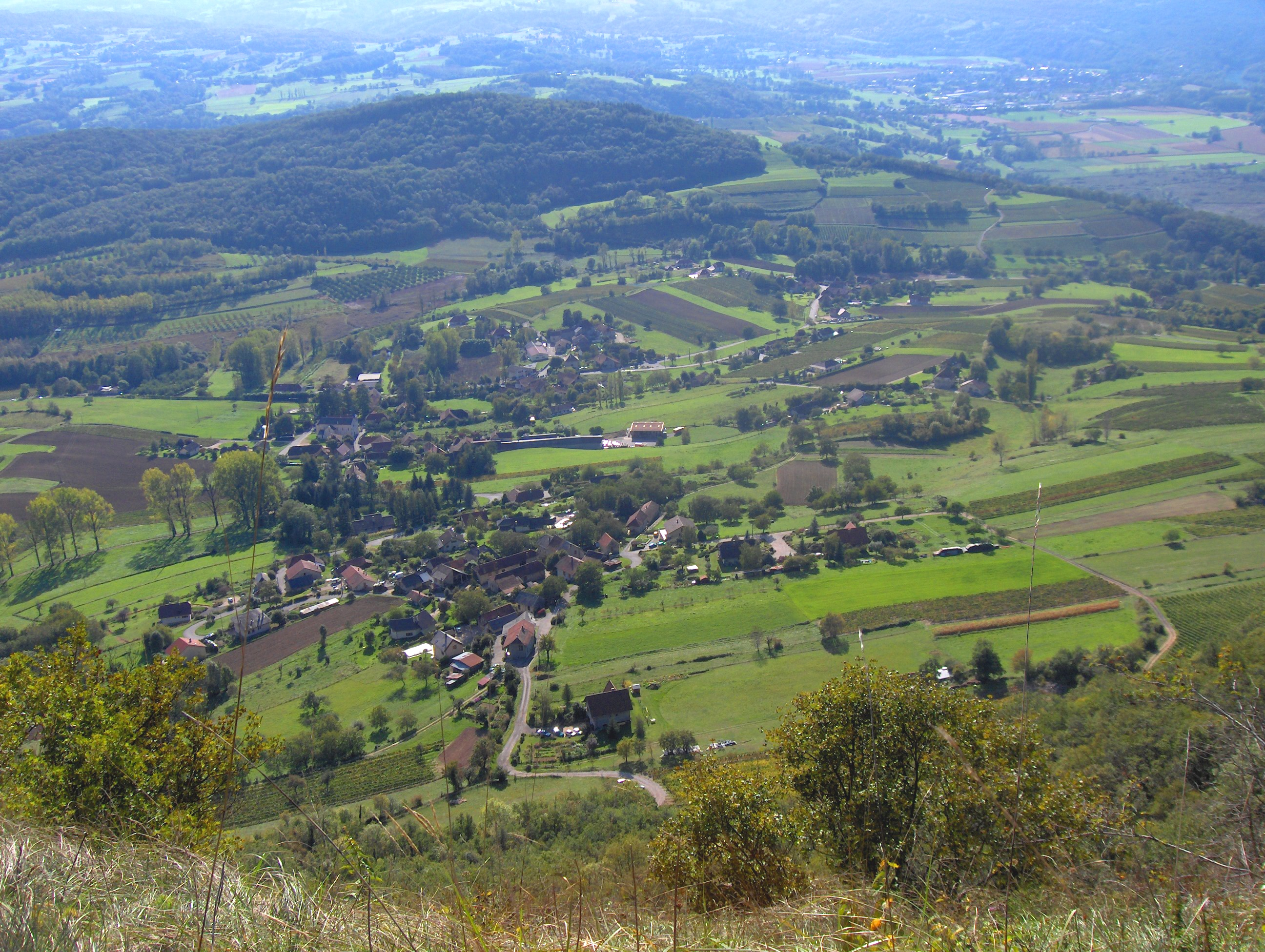 Vu de Billième depuis les Barmettes